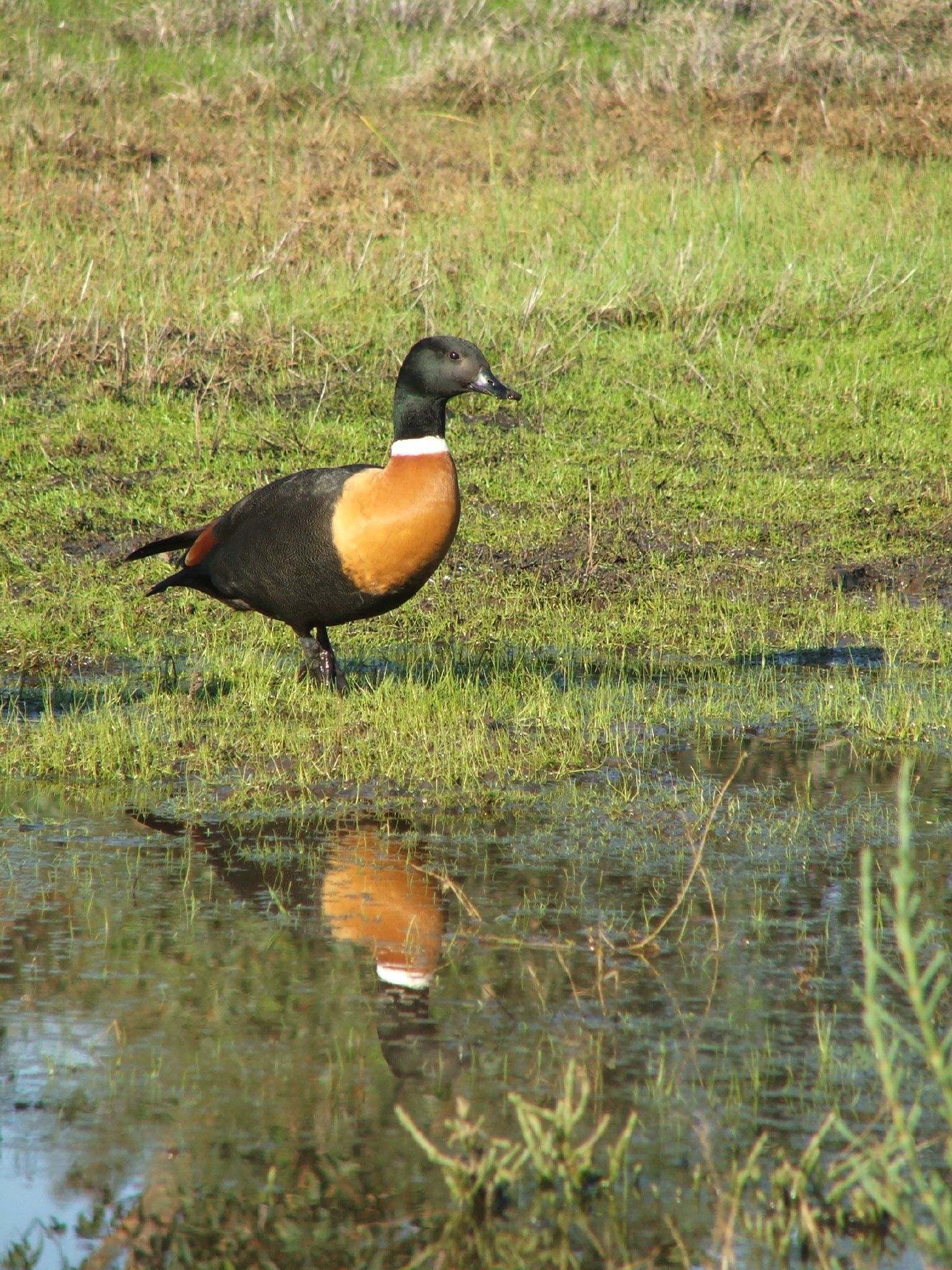 Australian Shelduck Tadorna tadornoides. Australia.